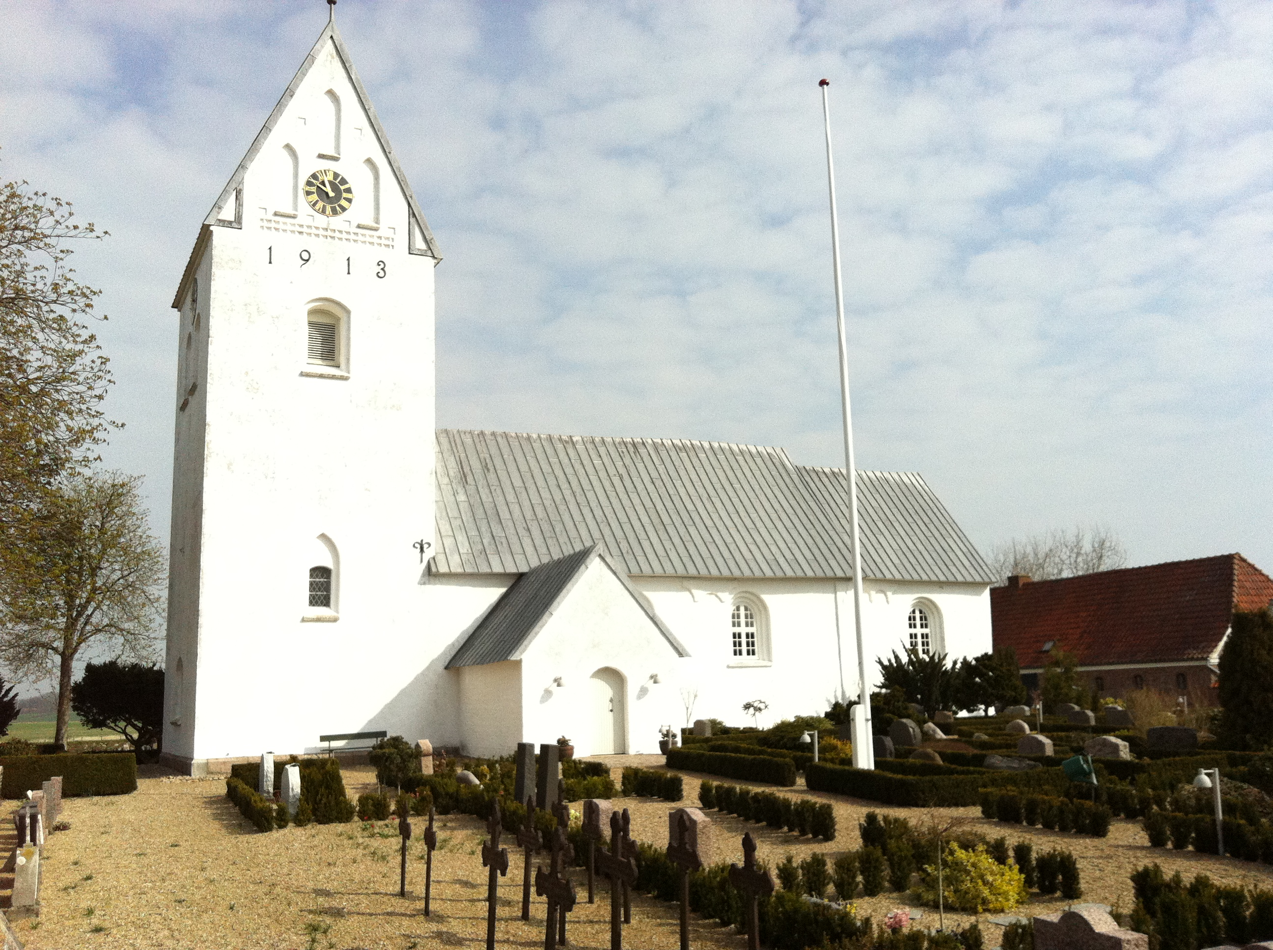 Hjortlund kirke den 4. maj 2013